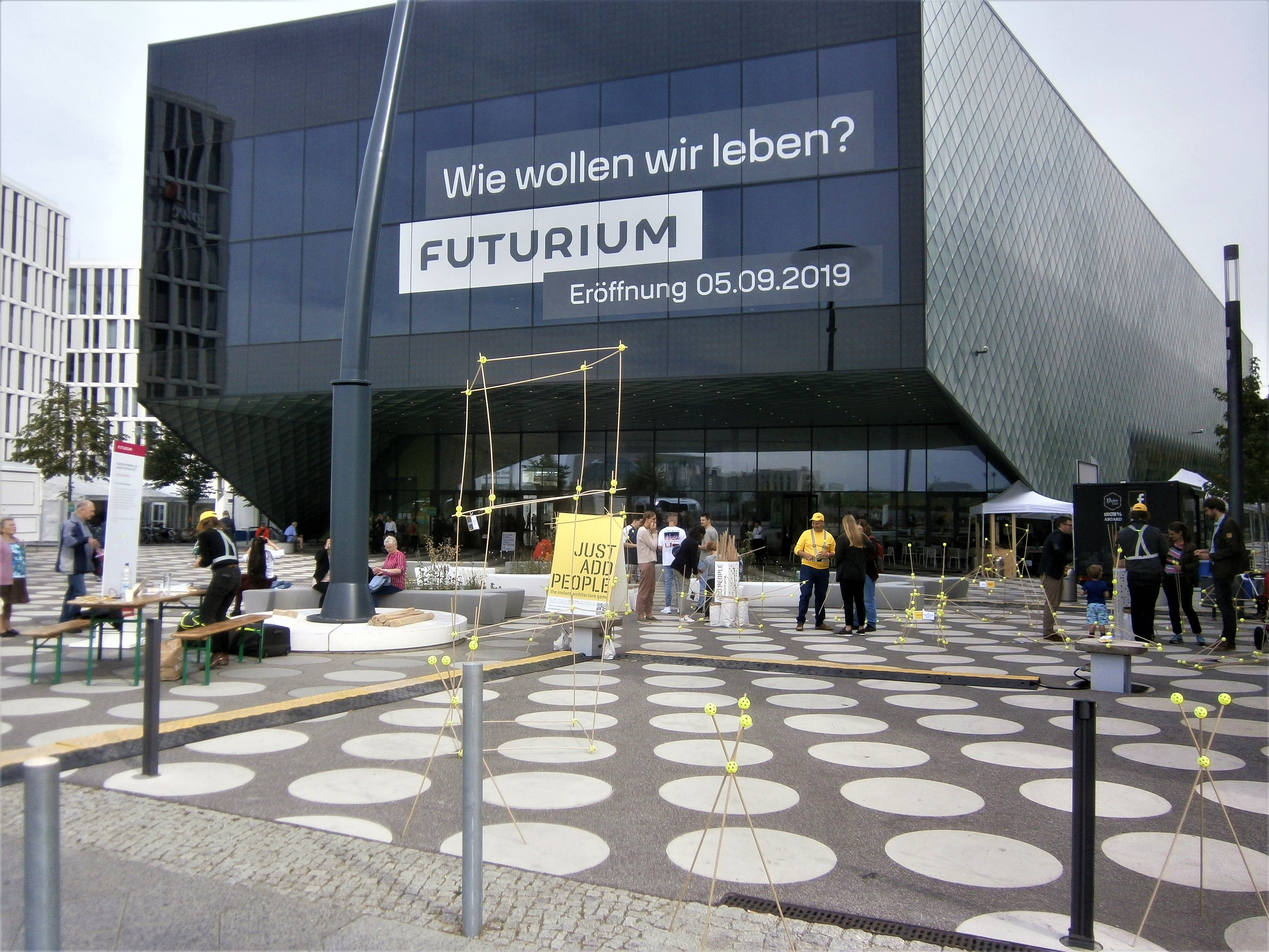 Der Südeingang des Gebäudes "Futurium" vom Ufer am Spreebogen über das Lapelle-Ufer hinweg am Tag des Eröffnungsfestes. Im Vordergrund Straßenland und Punktmuster des vom Dach überkragten Vorplatzes.